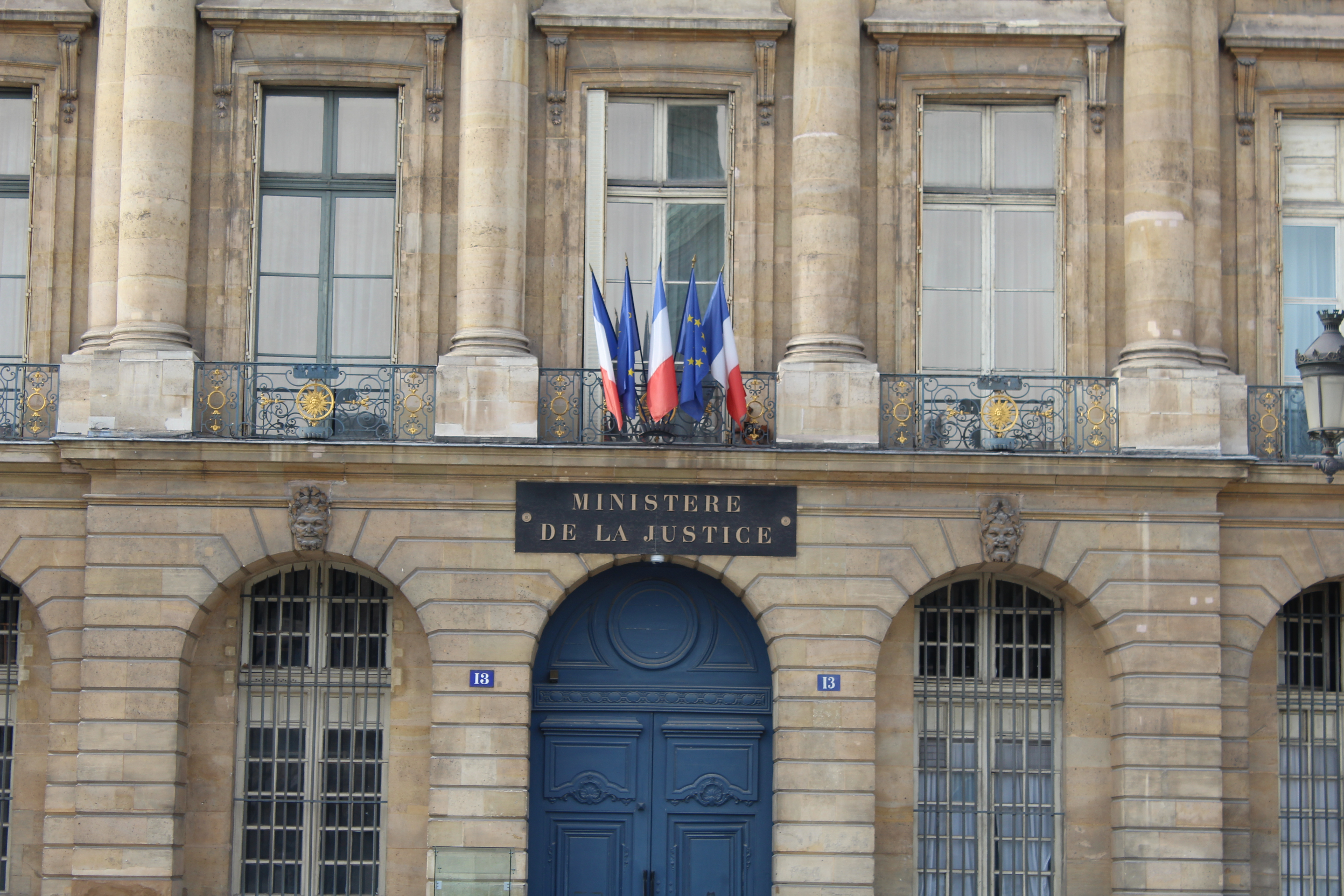 Hôtel de Bourvallais à Paris.